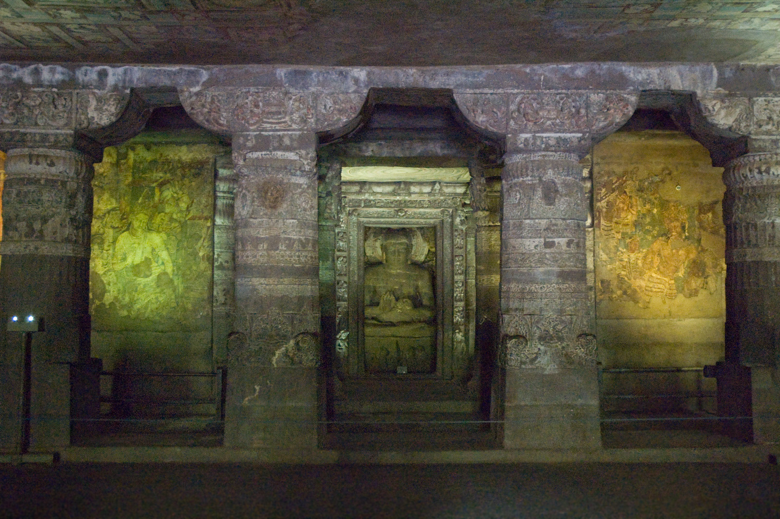 Ajanta Hoehle 1 Blick von der Haupthalle in die Cella, Ajanta Caves